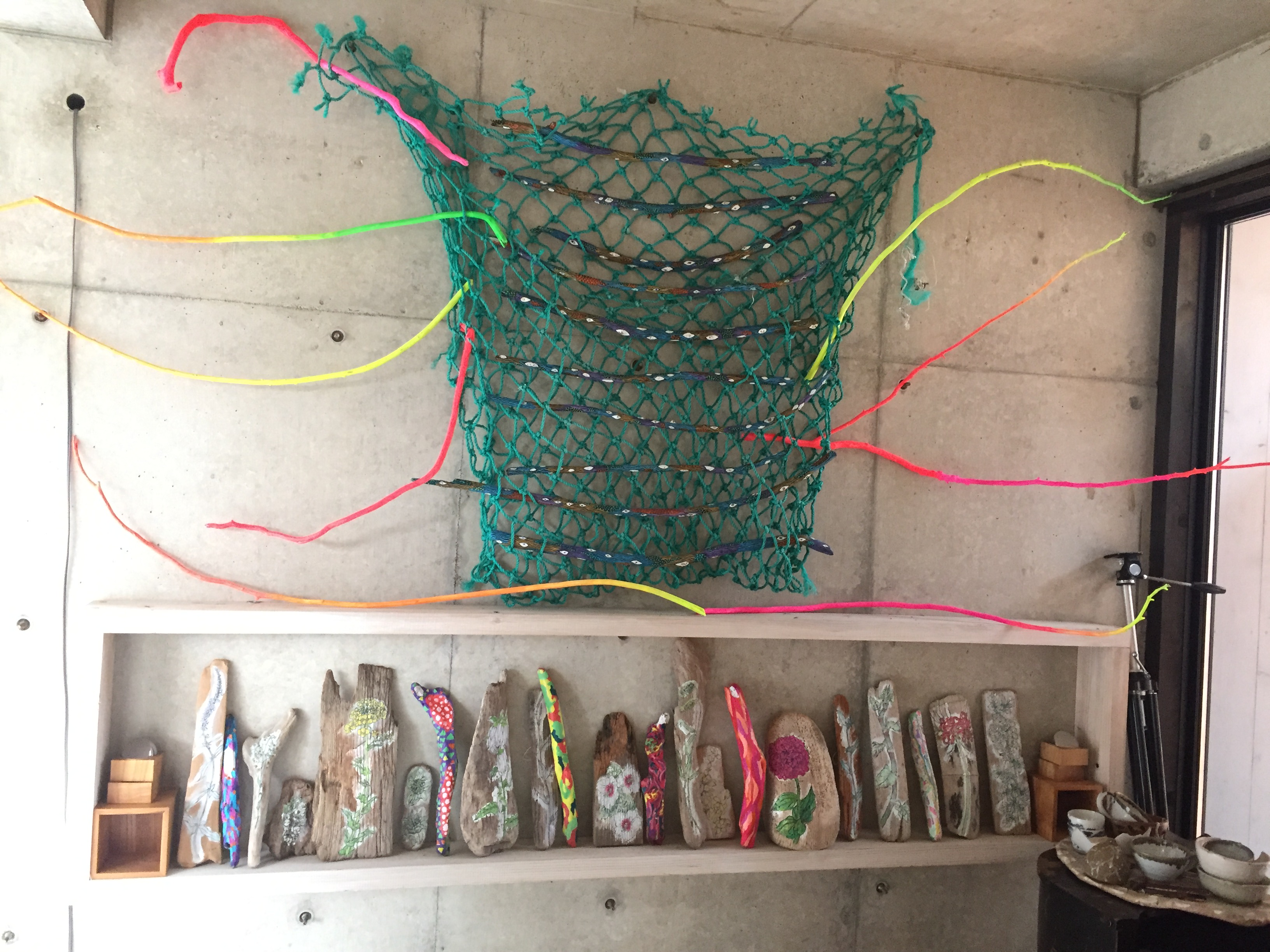 京丹後市網野町浜詰 ヒカリ美術館 2階フロア展示（2019.2.11時点） ※この写真は美術館の許可を得て撮影をしました。